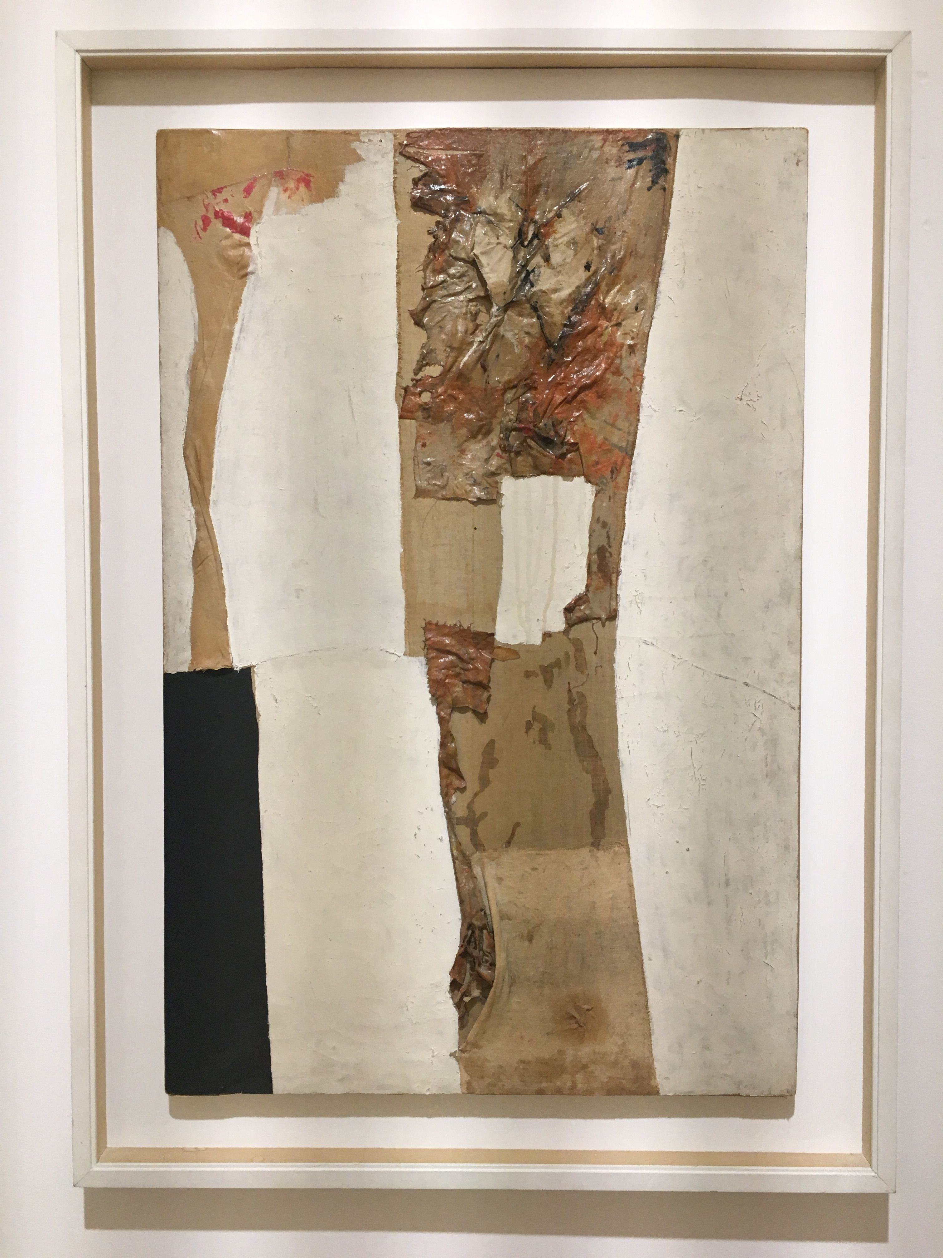 Pinacoteca civica Bruno Molajoli